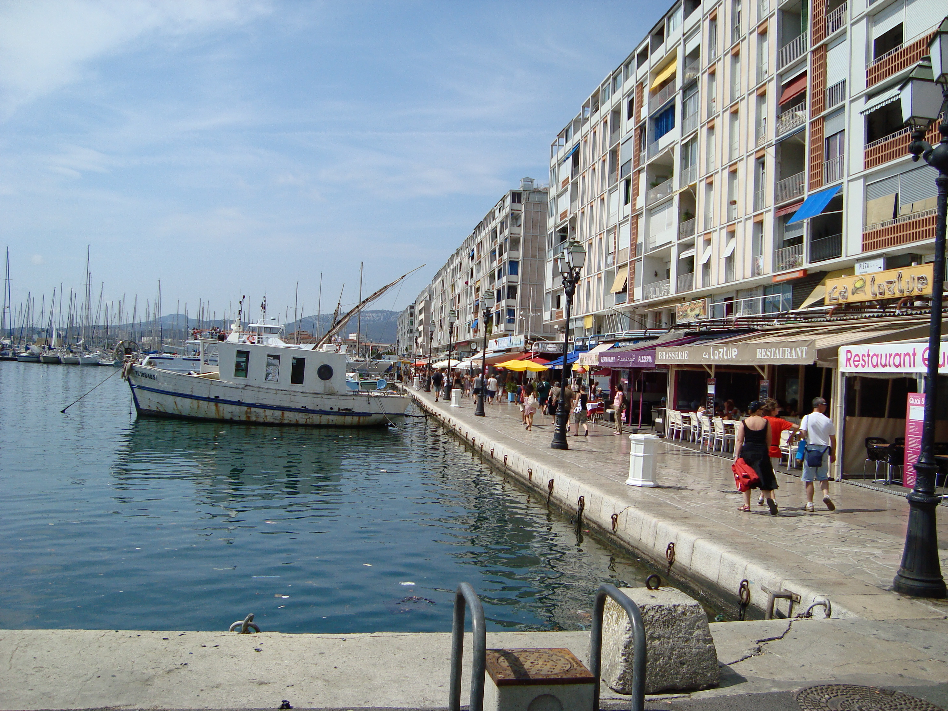 Toulon